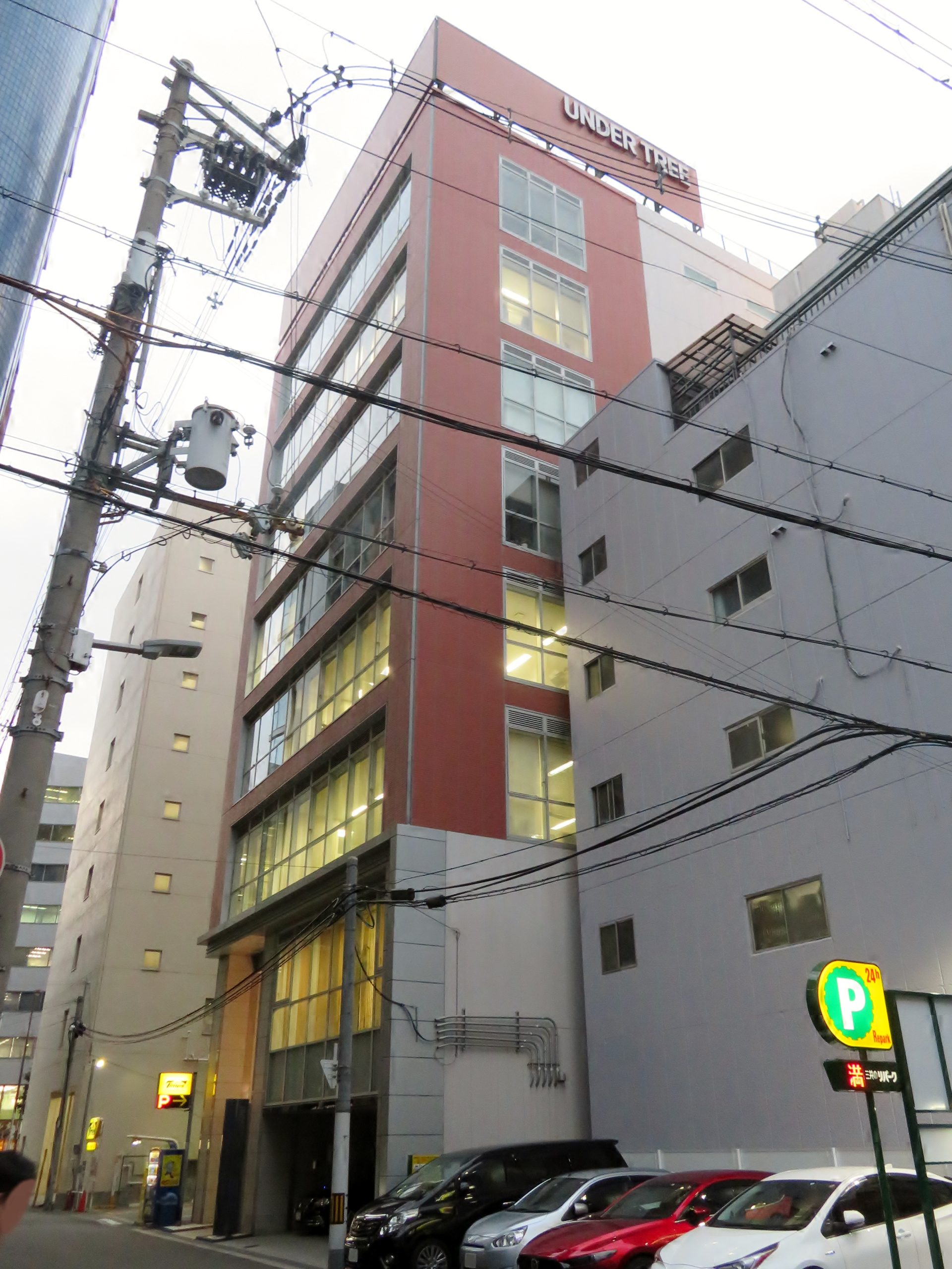 アンダーツリー株式会社本社を撮影。